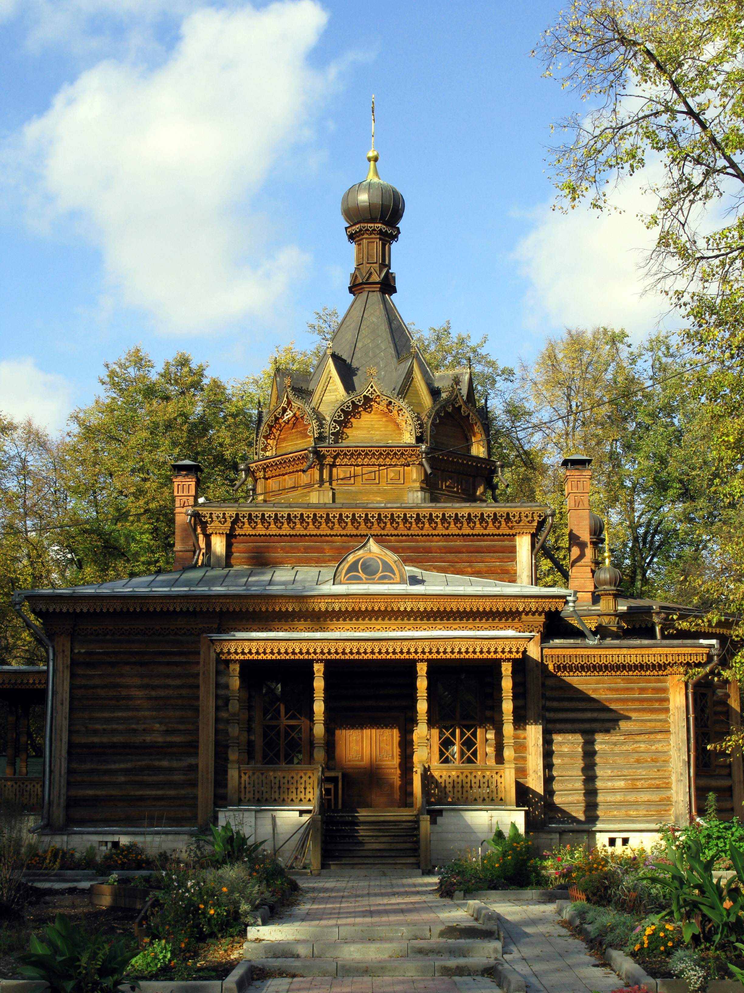 Храм Тихона Задонского в Сокольниках